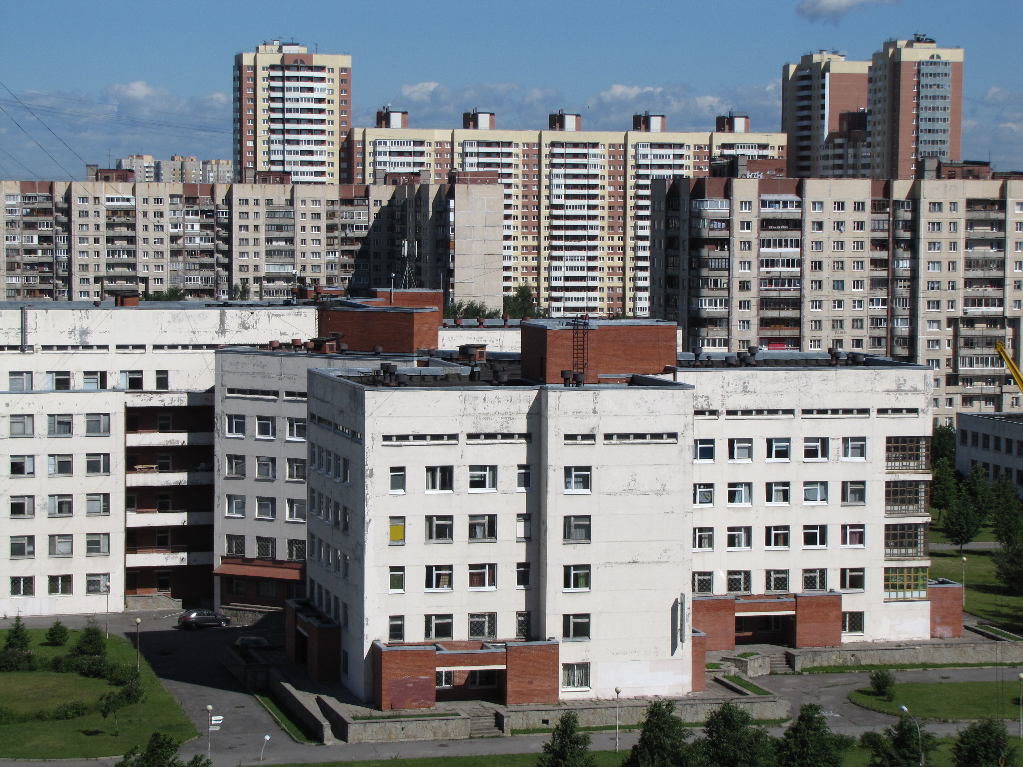 Детская Больница №5 им. Филатова